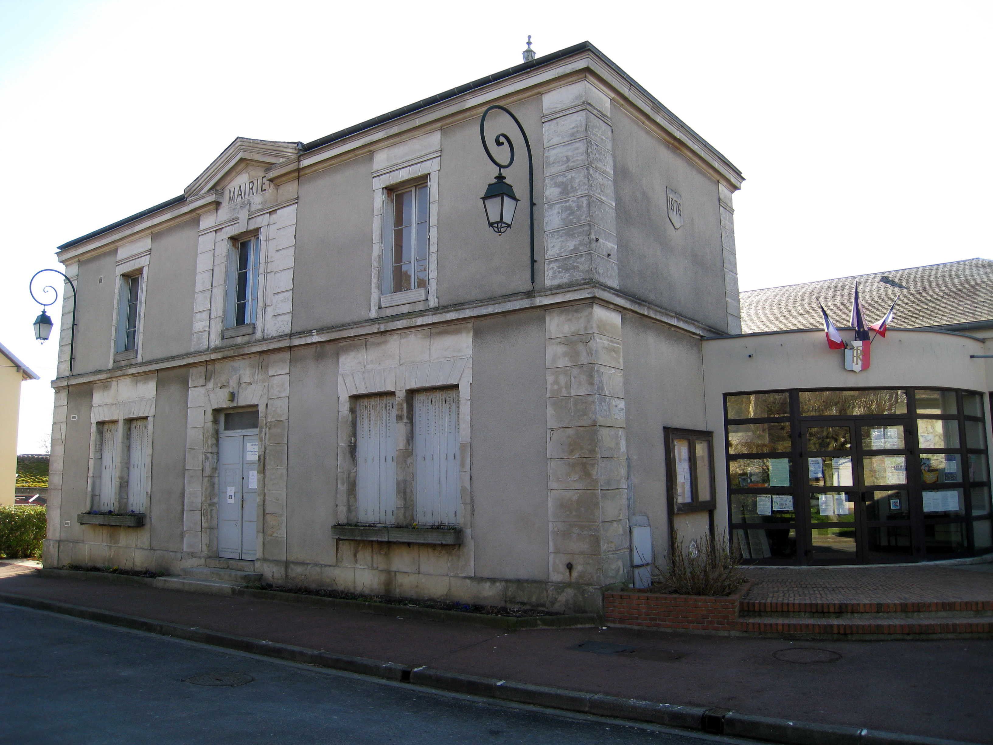 Mairie de Grisy les Plâtres, Val d'Oise, France